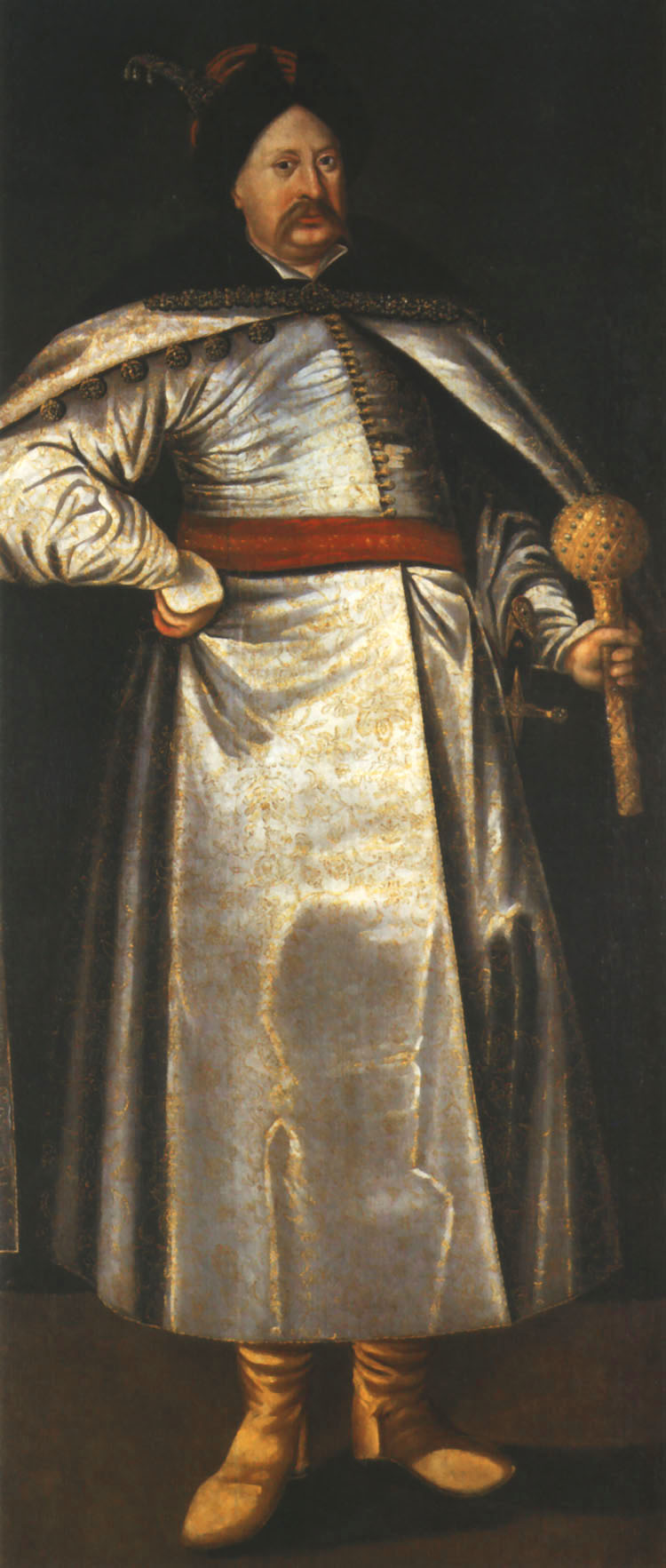 Portrait of Janusz Radziwiłł (1612–55)